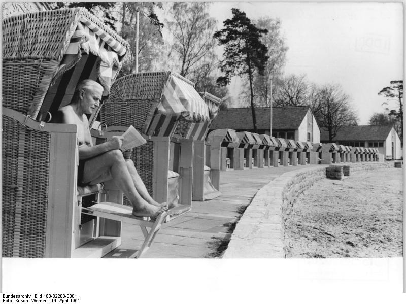 Berlin, Strandbad Wendenschloss, Strandkörbe Zentralbild Krisch 14.4.1961 Berliner Strandbäder rüsten zur Sommersaison. Letzte Vorbereitungen werden gegenwärtig in den sechs Strandbädern des Stadtbezirkes Köpenick getroffen, um bis zur Eröffnung der diesjährigen Badeseison am 1. Mai gerüstet zu sein. (Näheres siehe ADN-Meldung 56-402). UBz: Noch vor Beginn der offiziellen Badesaison kommen die ersten "Sonnen- und Lufthungrigen" - in das Strandbad Wendenschloß. Alle Strandkörbe wurden im Winter gründlich gesäubert und neu angestrichen.